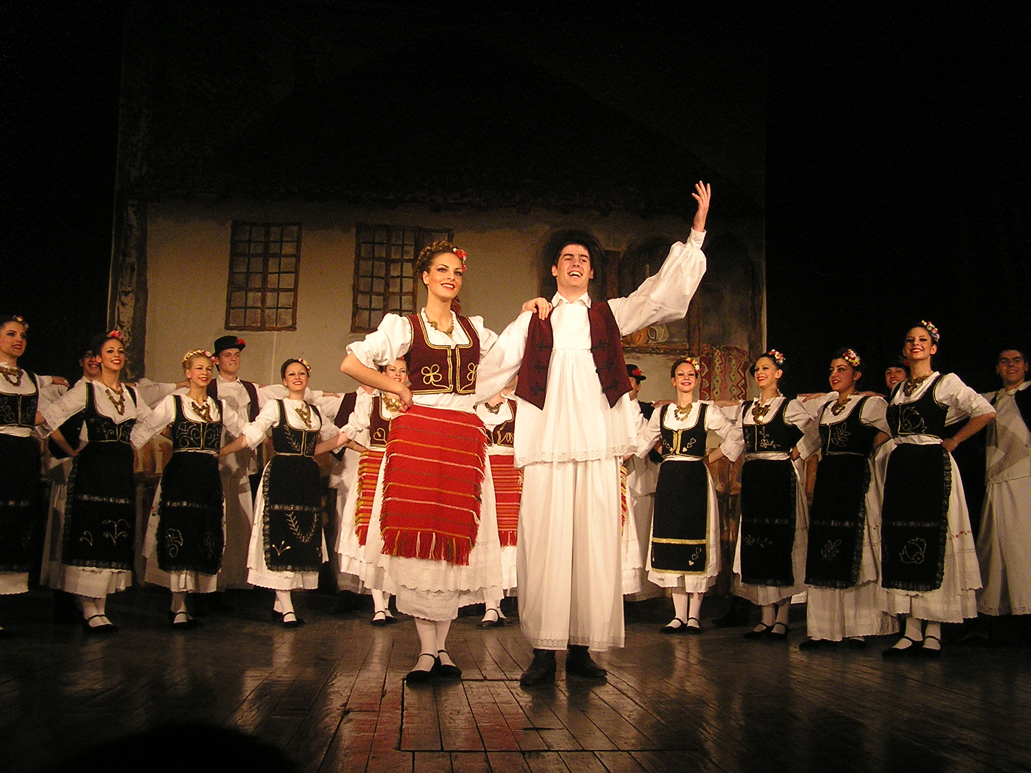 Godišnji koncert 24. decembar 2005./ Nova Pazova